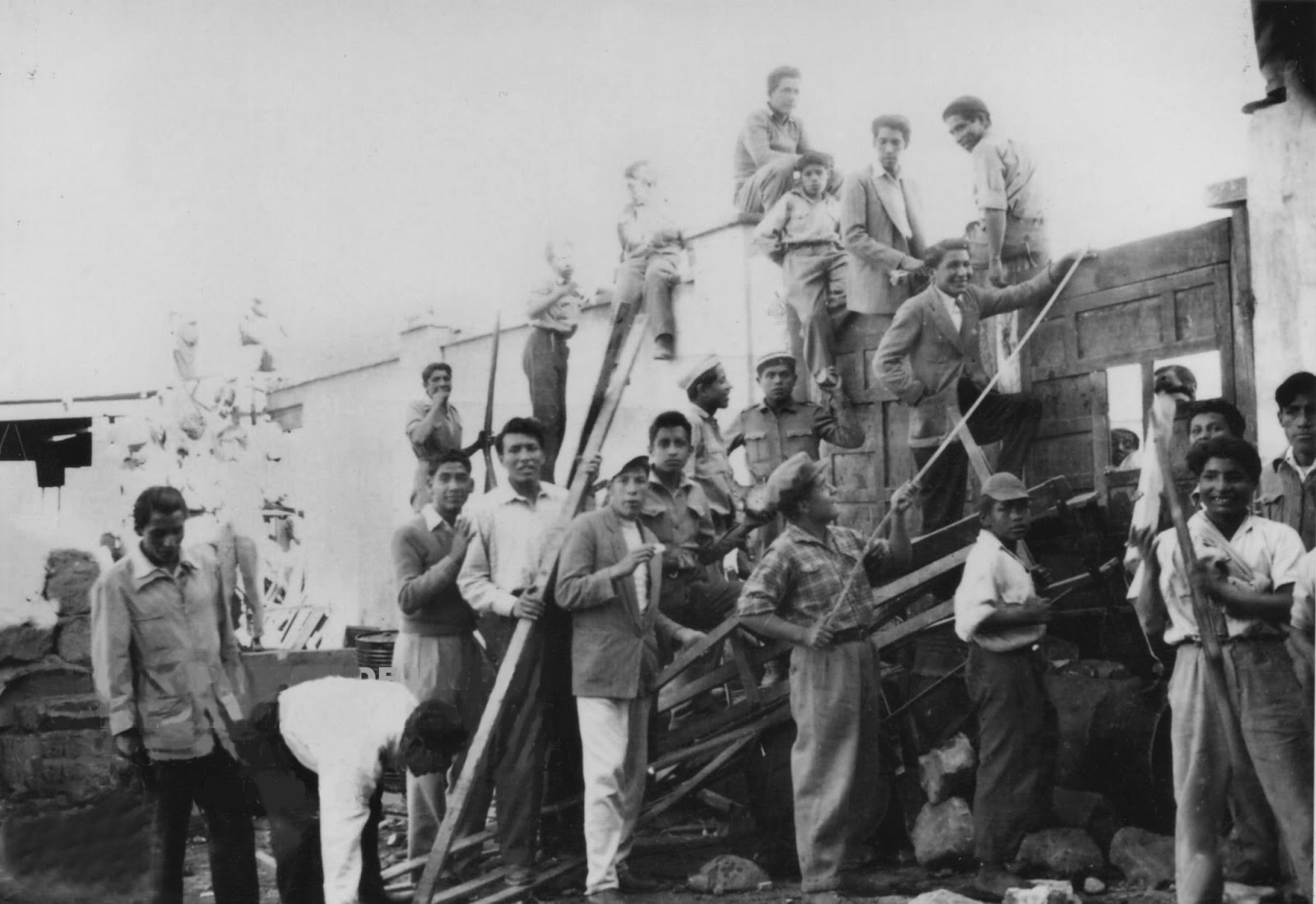 Alumnos del Colegio Independencia trancando el portón Norte.